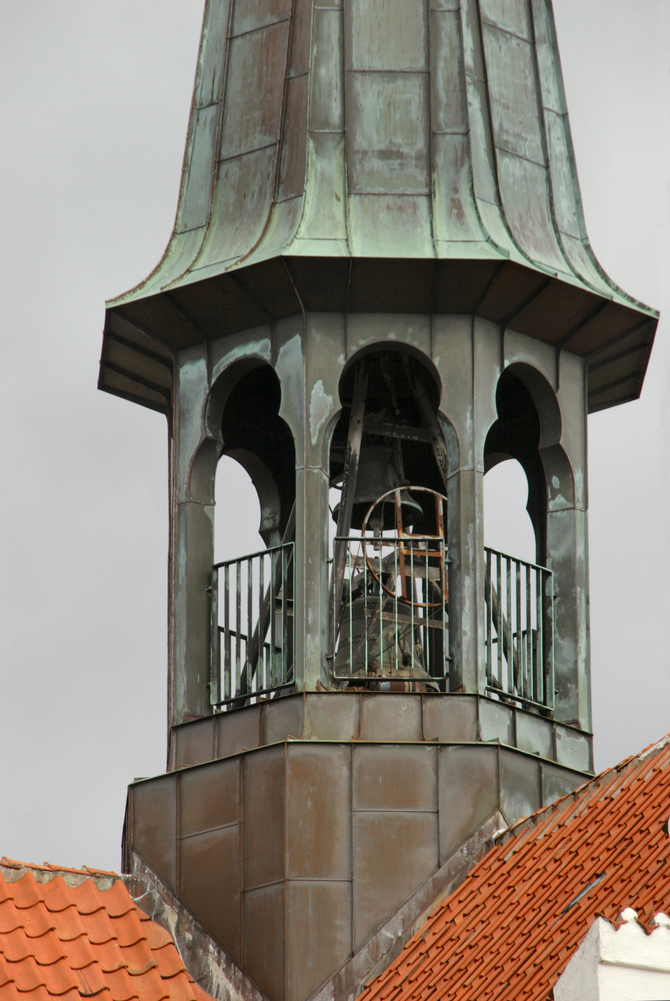 Lanterne på Åby Kirke ved Århus med kirkeklokke